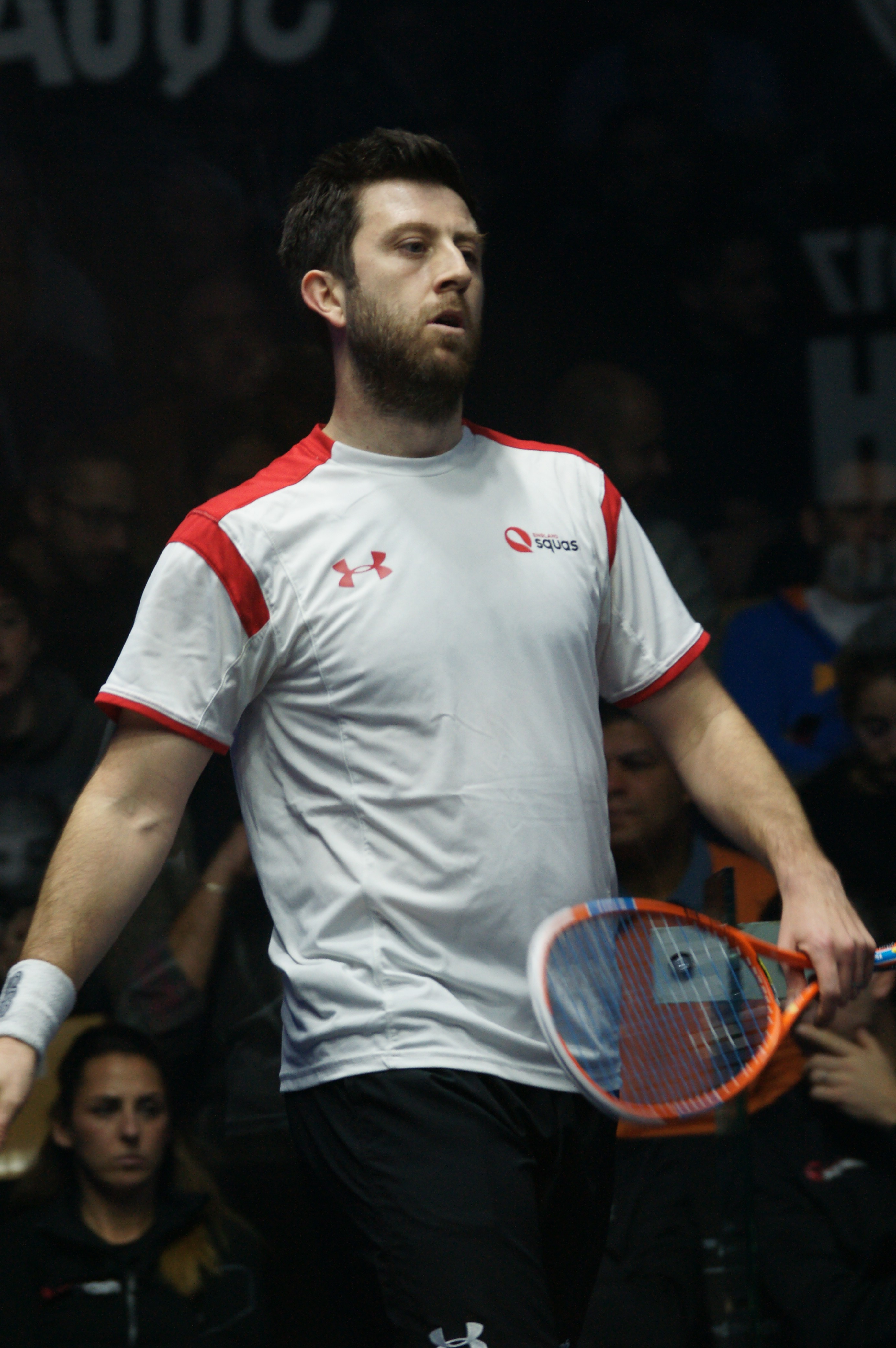 Daryl Selby, championnats du monde de squash par équipe Marseille 2017